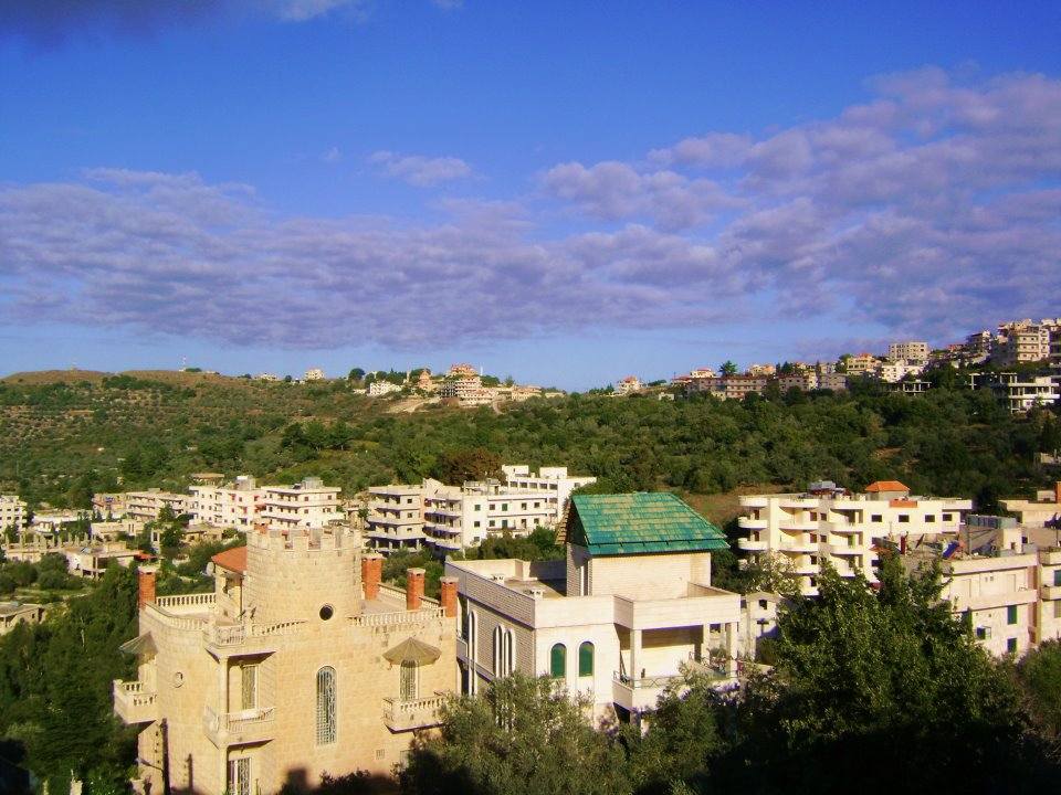 ville de marmarita